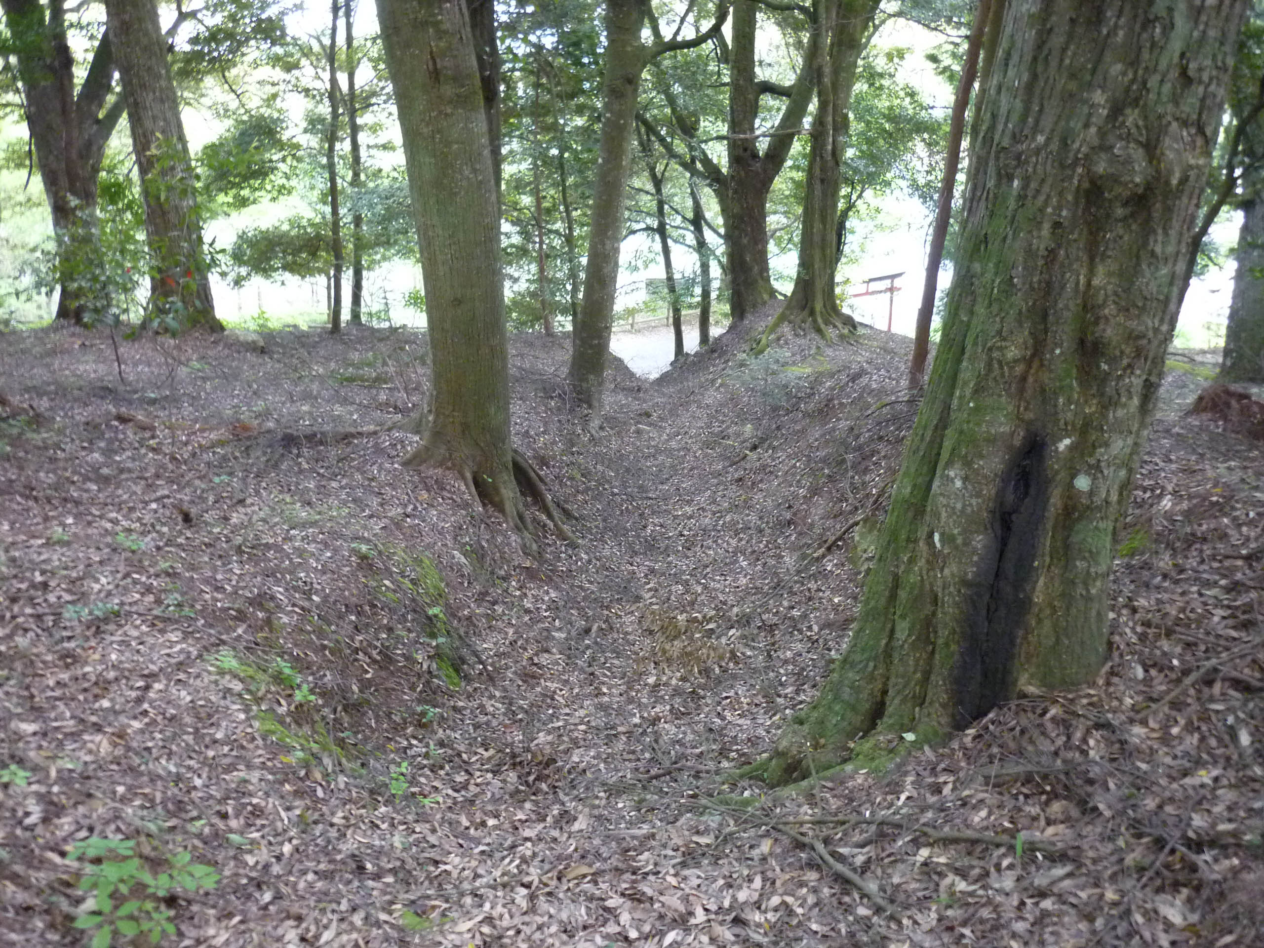 竪堀跡